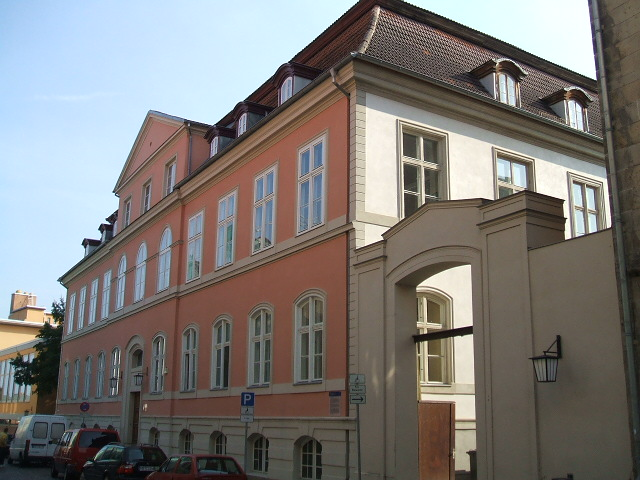 Stralsund, Germany, Badenstraße, Schwedisches Regierungspalais (2006-09-29). Auch: Meyerfeldtsches Palais.